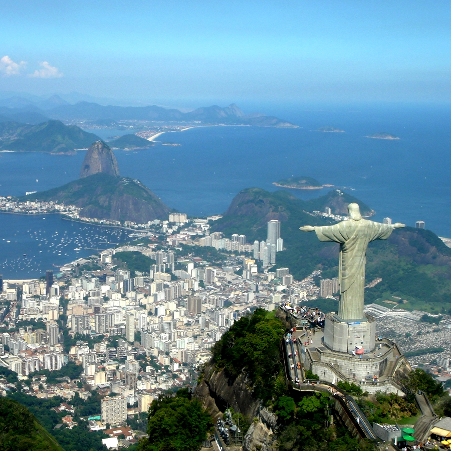 Vista panorámica del Cristo Redentor, Bahía de Guanabara, Pan de Azúcar y Botafogo, Río de Janeiro, Brasil.